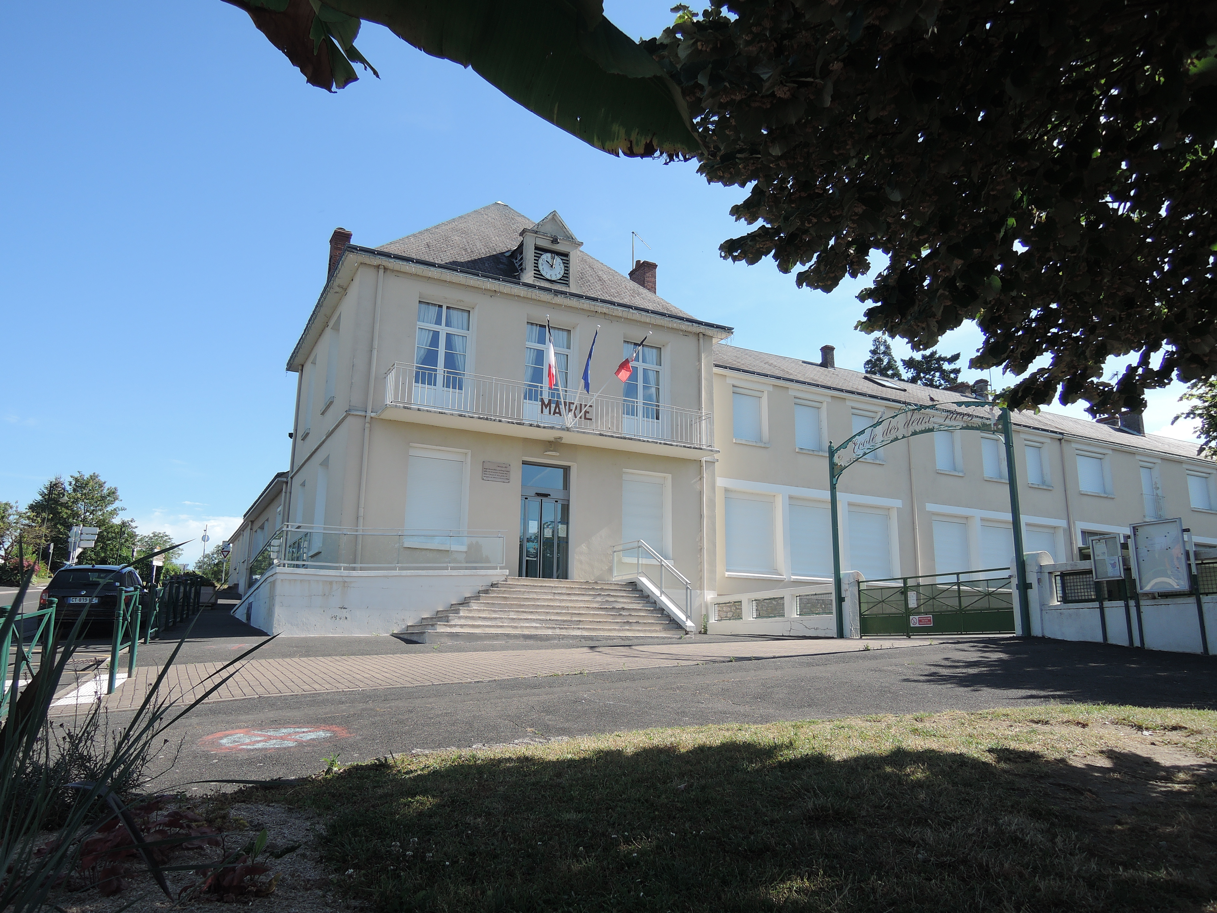 Façade sud